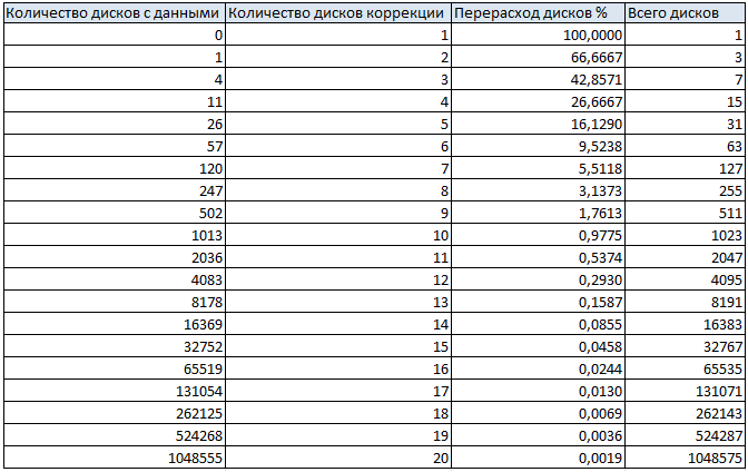 Расчетное количество дисков для организации RAID 2